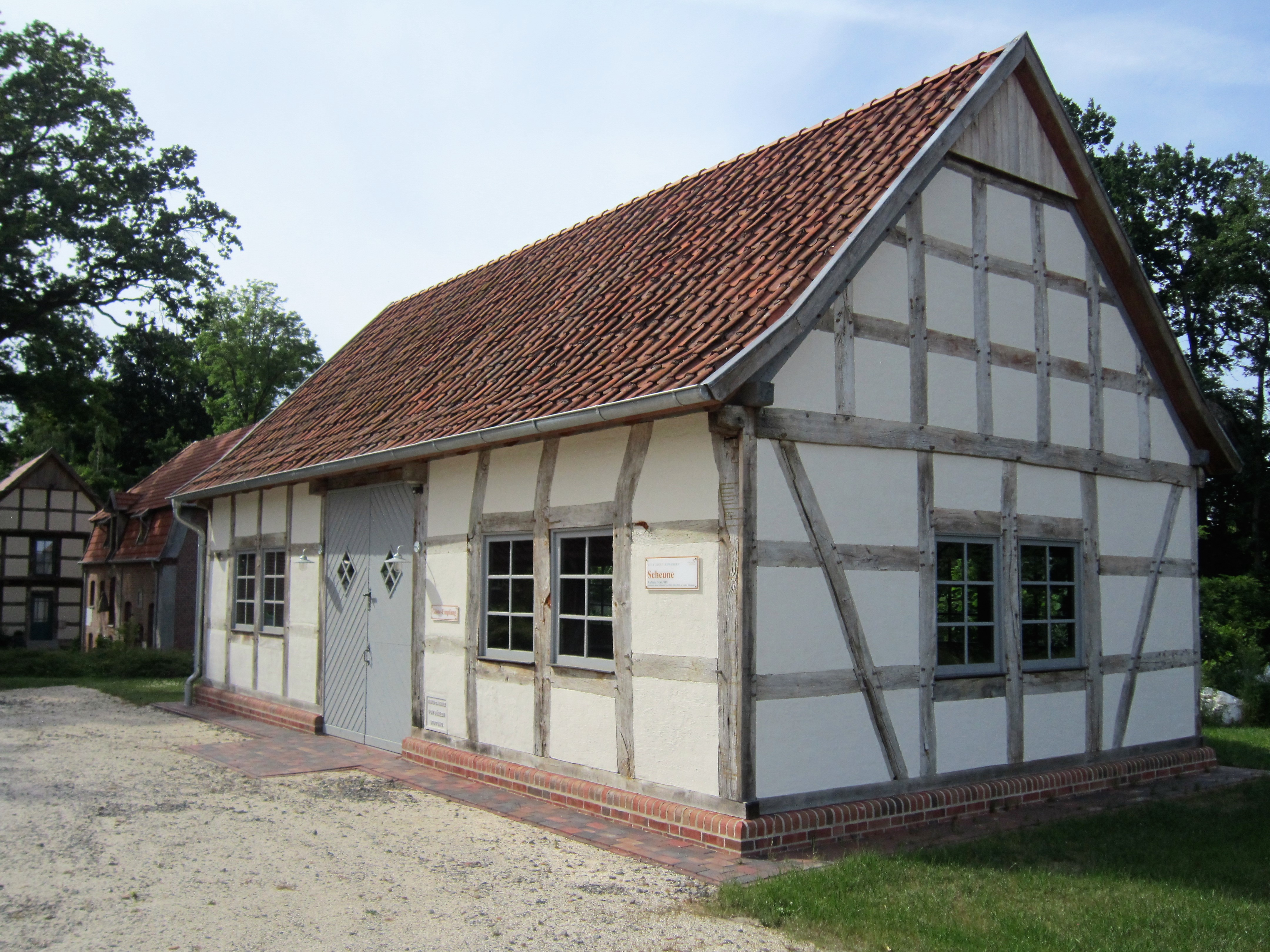 2018 an das Industriedenkmal Bredemeyers Hof in Goldenstedt (Landkreis Vechta in Niedersachsen) angebaute Scheune. Die Anlage befindet sich an der Landesstraße von Vechta nach Twistringen.